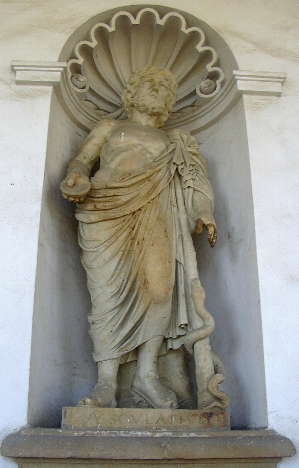 Asclepius - socha Kroměříž Květná zahrada